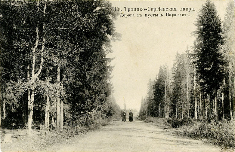 Открытка «Дорога в пустынь Параклита от Троице-Сергиевой лавры». 1912 год. Сергиевский посад: Изд. С. И. Белякова, 1912. (М. Kampel. Moskau 5. 25)